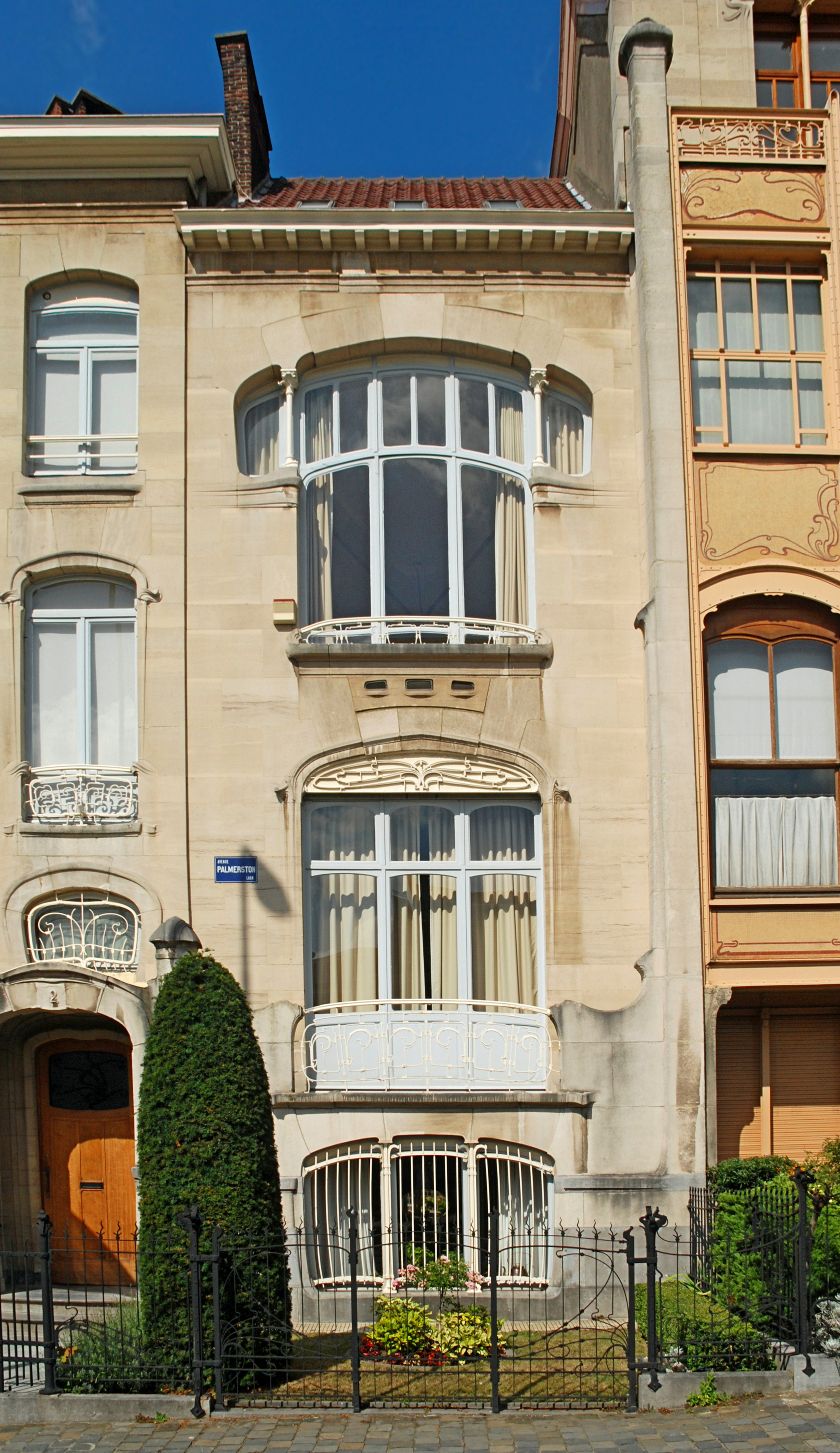 Belgique - Bruxelles - Hôtel Van Eetvelde (Art nouveau - Victor Horta - 1895)